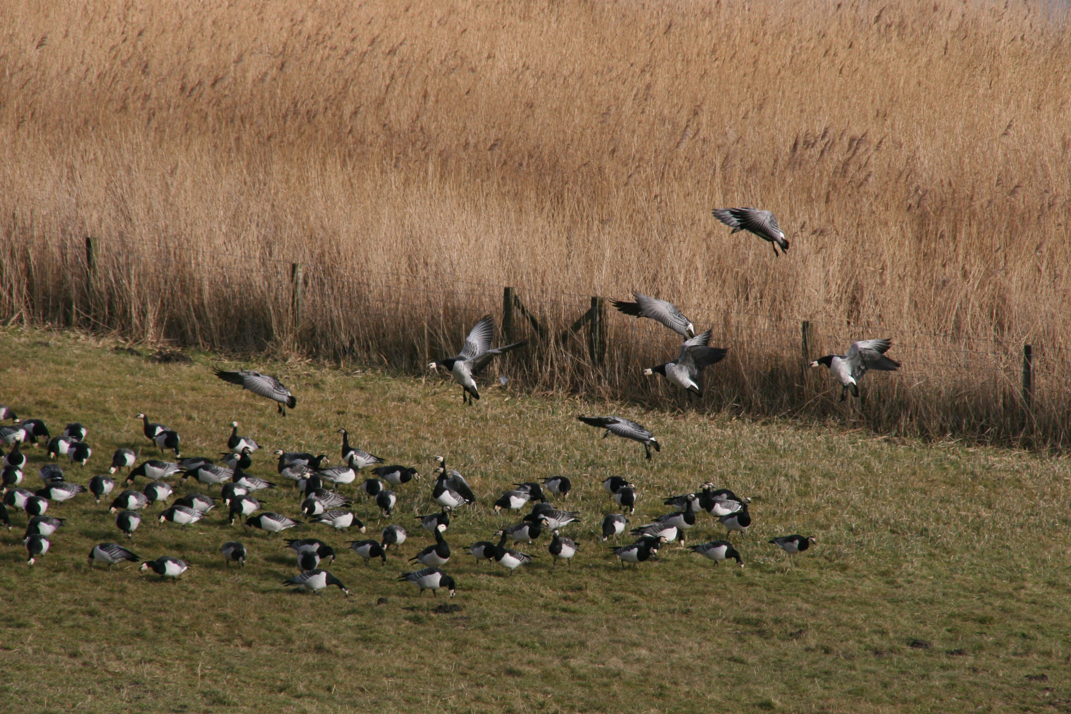 Weisswangengaense am Sammelplatz